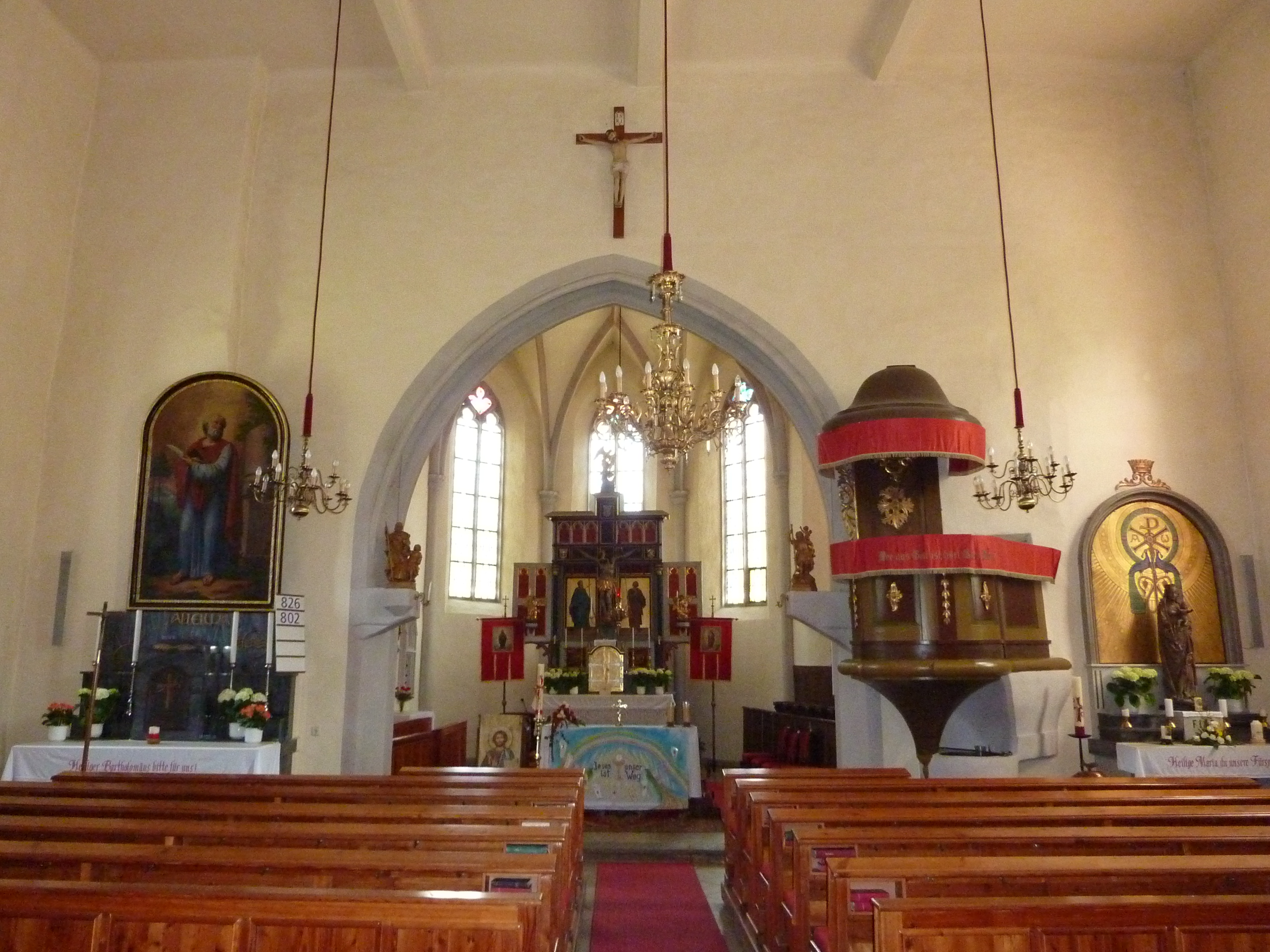 Pfarrkirche hl. Bartholomäus, Pöbring, Artstetten-Pöbring, Niederösterreich